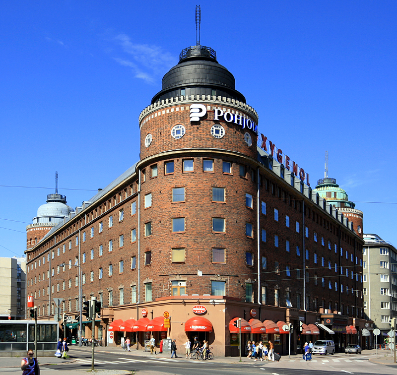 Arena, Hämeentie, Helsinki. Built 1920s. Architect: Lars Sonck.